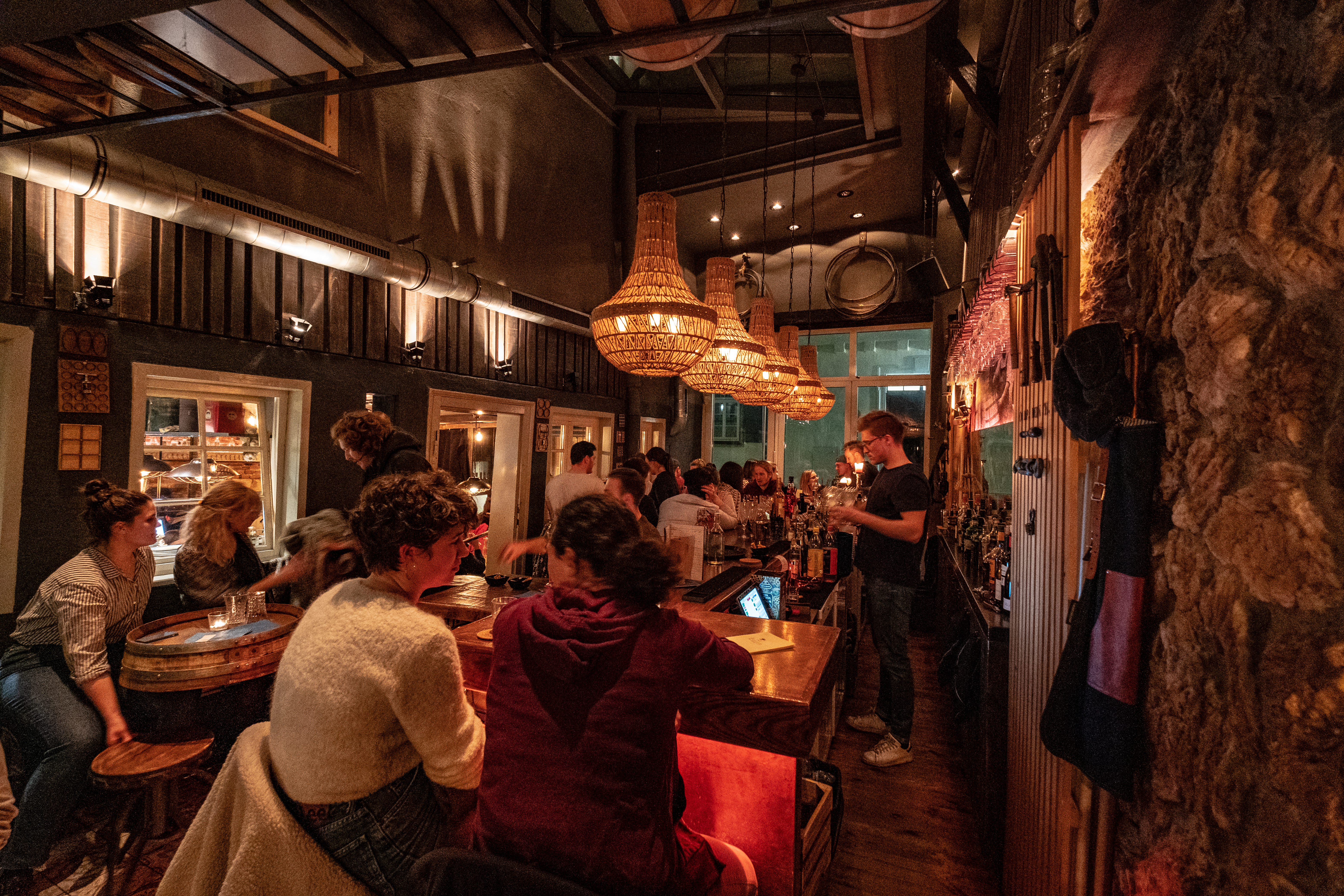 Bären in Tübingen mit neuem Bar-Bereich